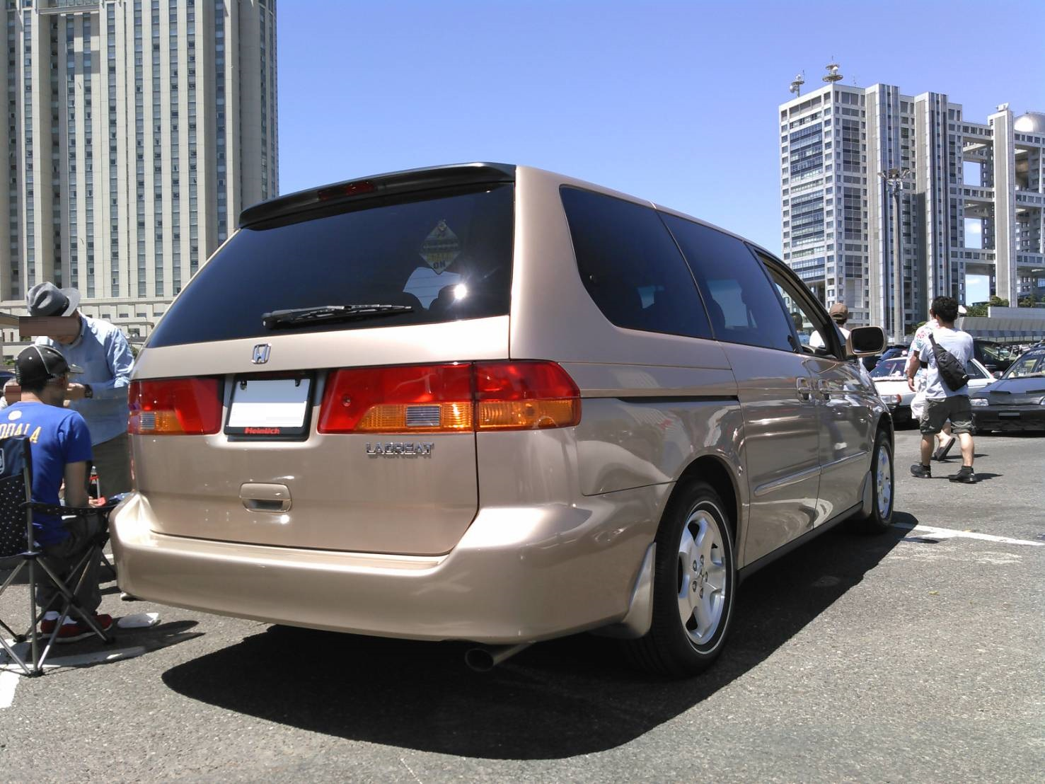 メサベージュメタリック